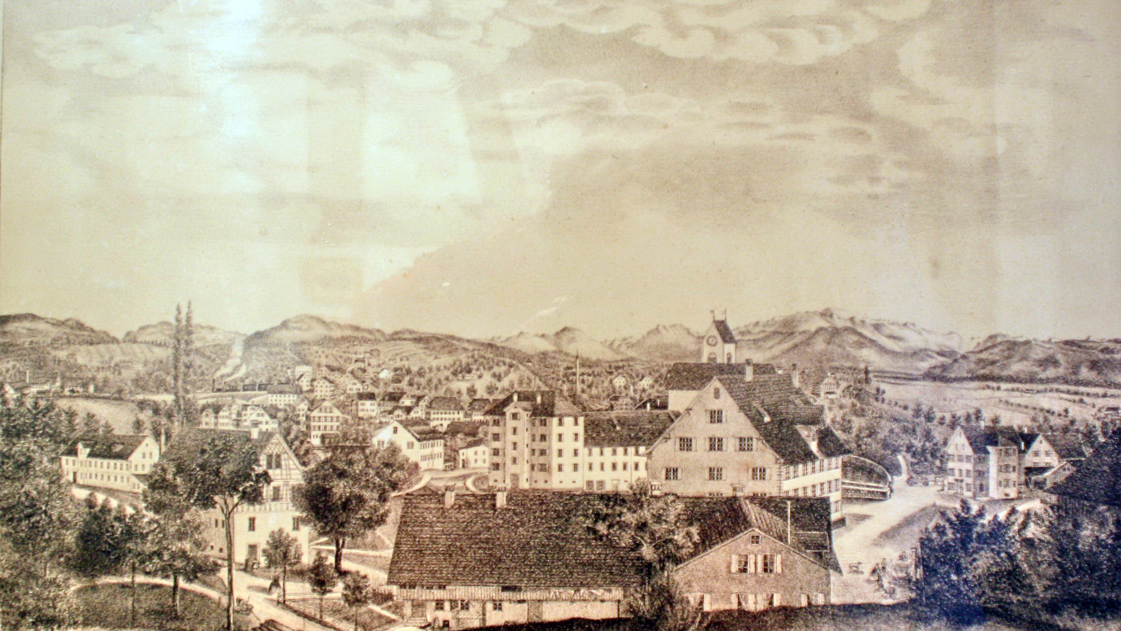 Rüti (ZH) im Jahr 1864 : Ansicht von der Schanz, links das Pfarrhaus, Spitzerliegenschaft, Amthaus und ehemalige Klosterkirche. Originalbeschreibung: gezeichnet u. lith. von Frau B. Aemisegger im Obertoggenburg